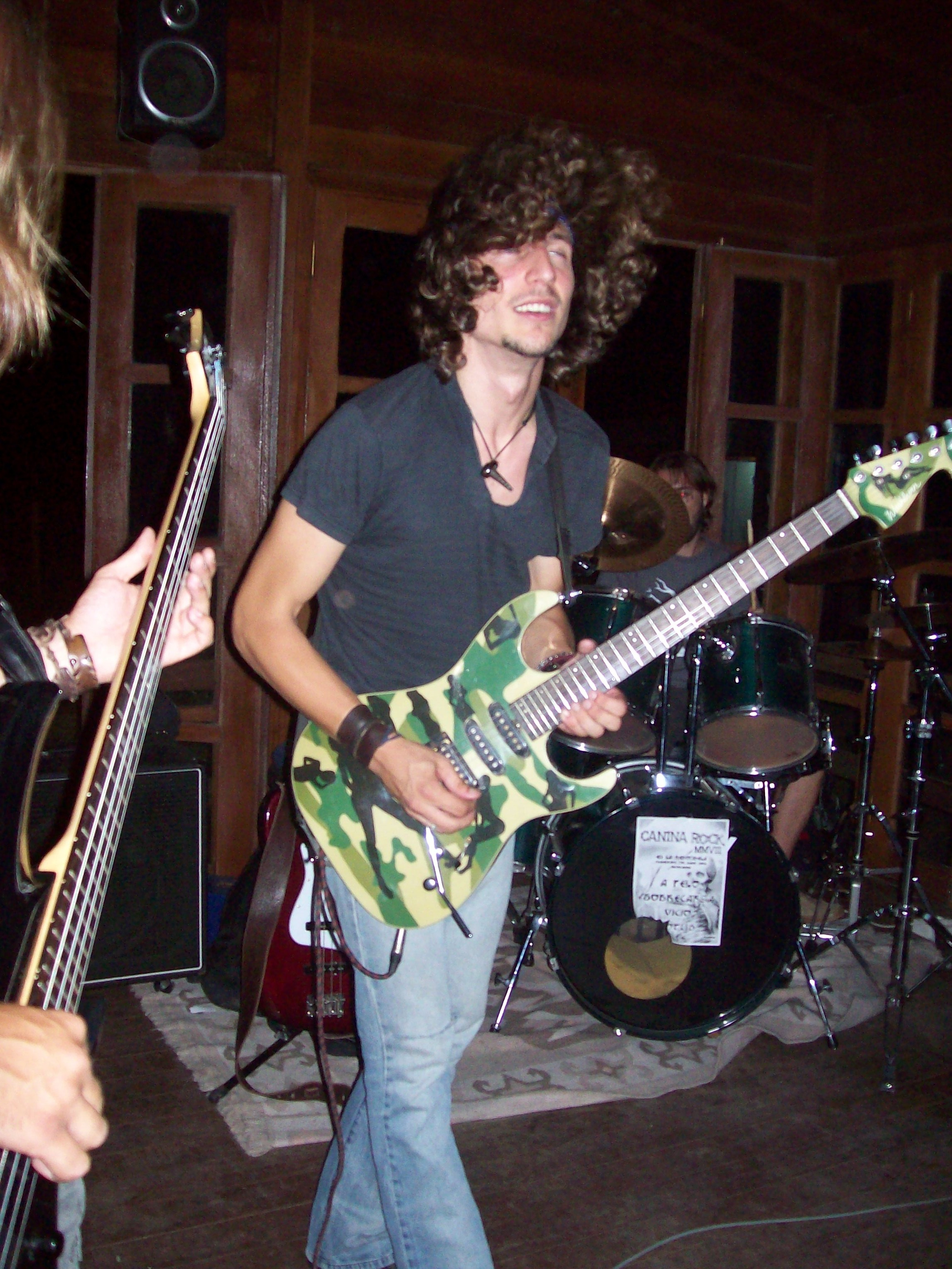 Jesús Berjillos con el grupo Sobrecarga en el primer Kanina Rock